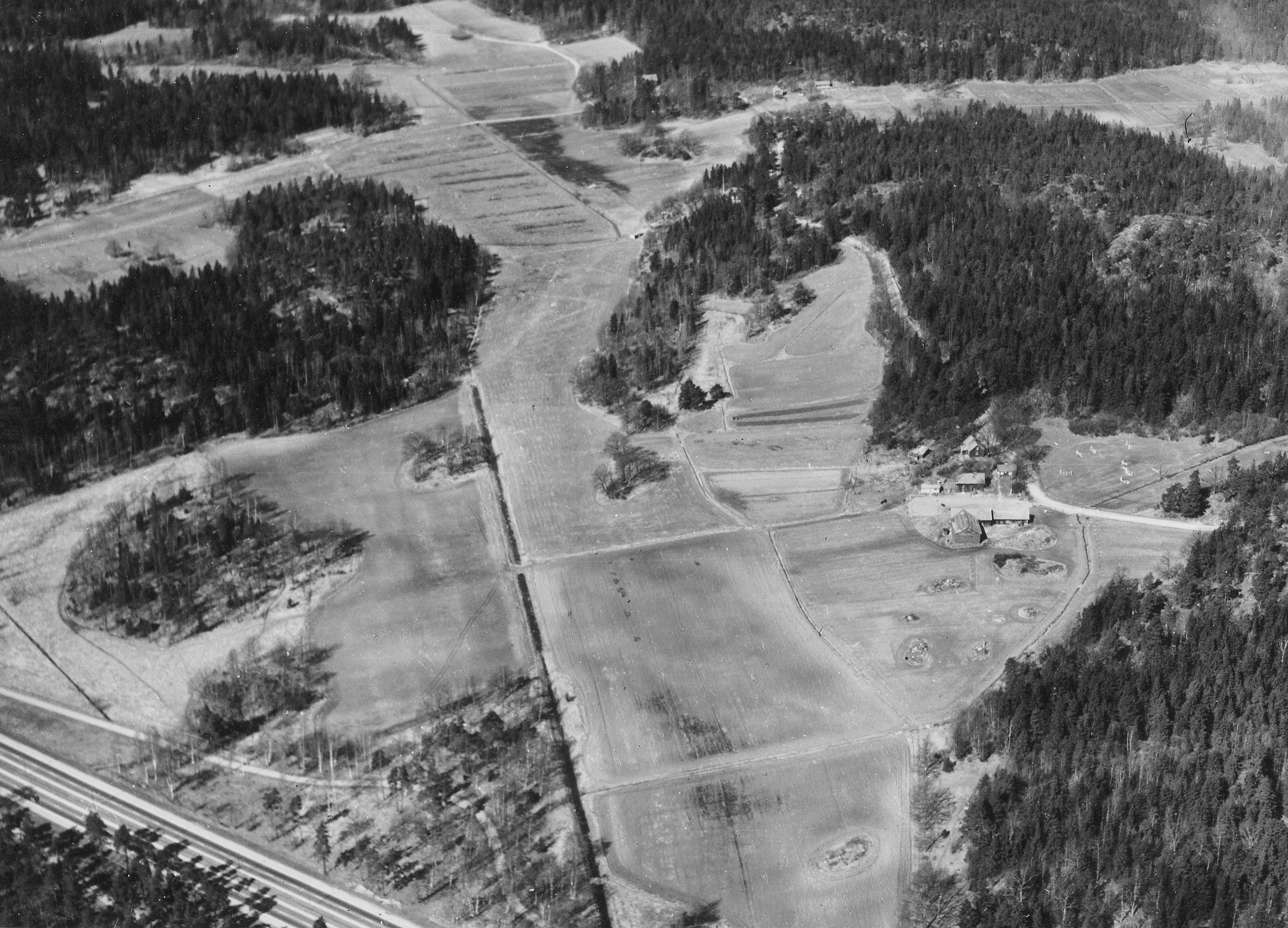 Flygfoto över gården Bredäng med omgivning, ner till vänster syns en bit av Södertäljevägen.